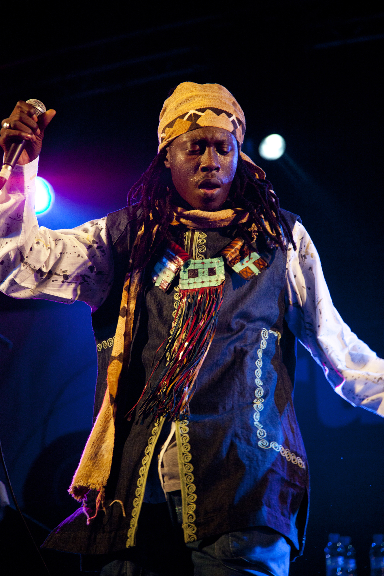 Daara J Family - Cruïlla BCN 2010